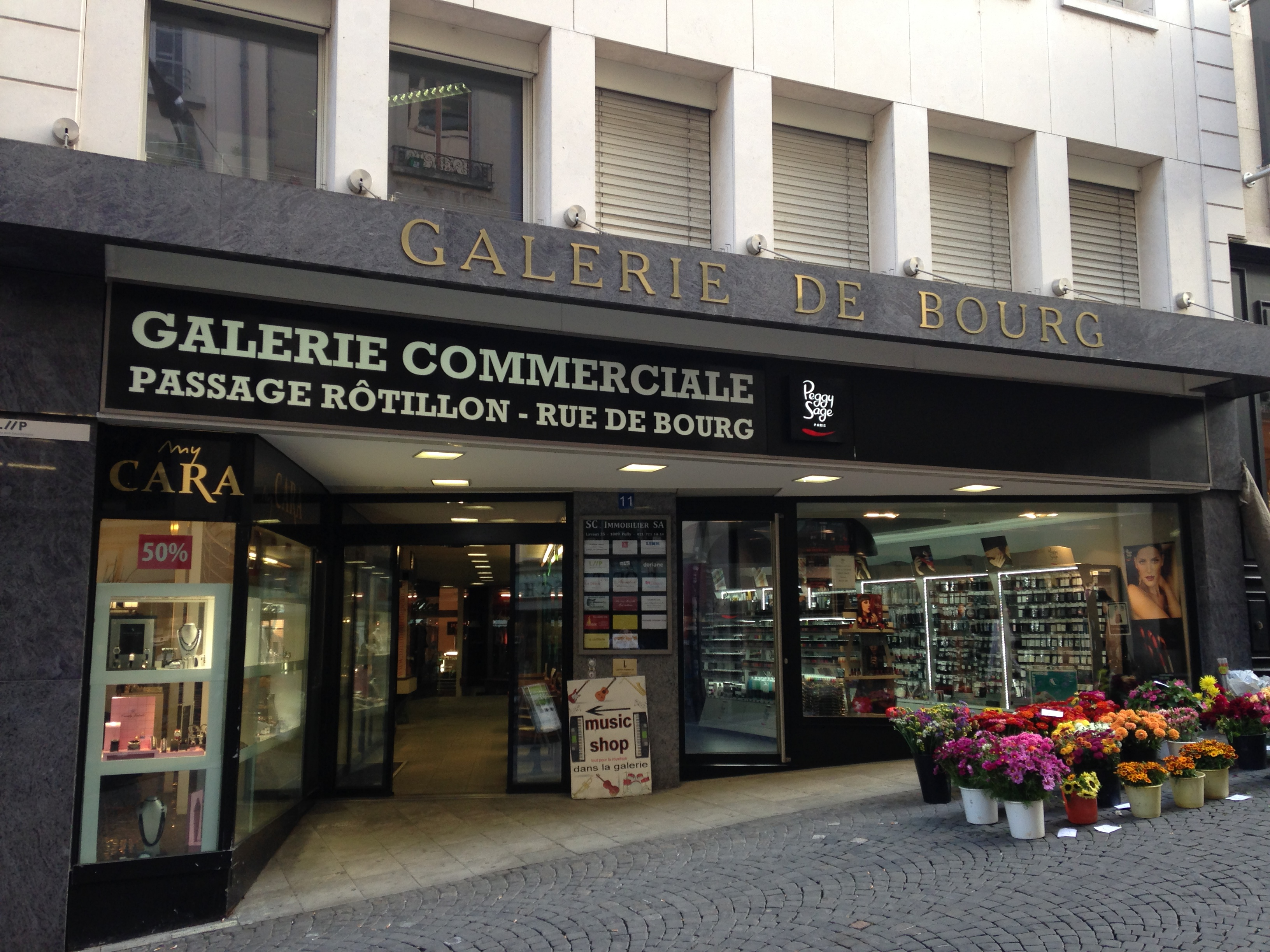 Provident loan company, mont de piété, mont-de-piété, prêt sur gage, achat or, vente or, investissement, négoce, diamants, pierres précieuses, social, responsabilité crédit, valorum, 123goldexpert